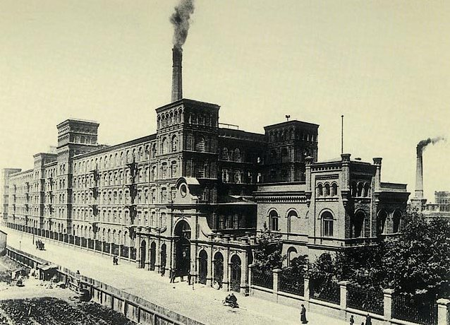 Fabryka Izraela Poznańskiego w Łodzi, ul. Ogrodowa 15/21.